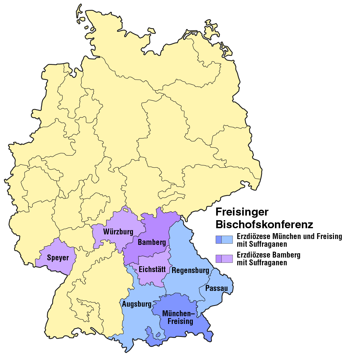 Karte zur Freisinger Bischofskonferenz